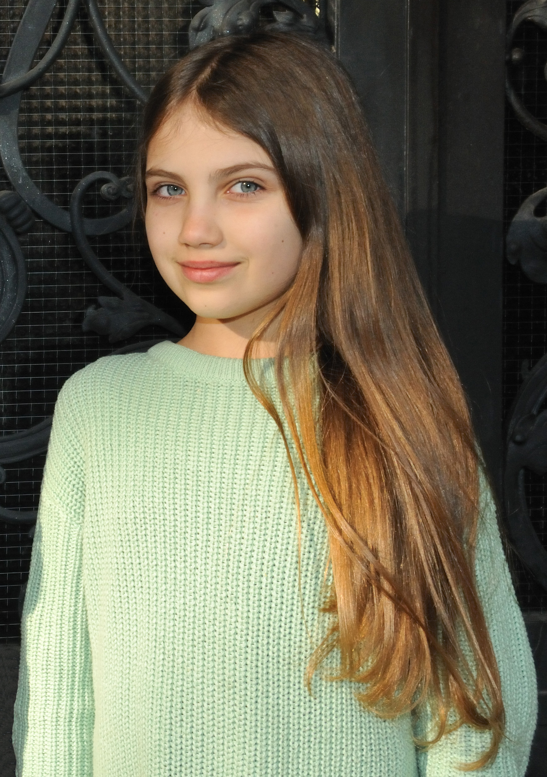 Helena Pieske 2018